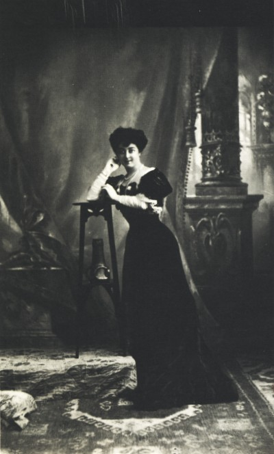 Die Tänzerin Saharet auf einer Atelierfotografie von Louis Held